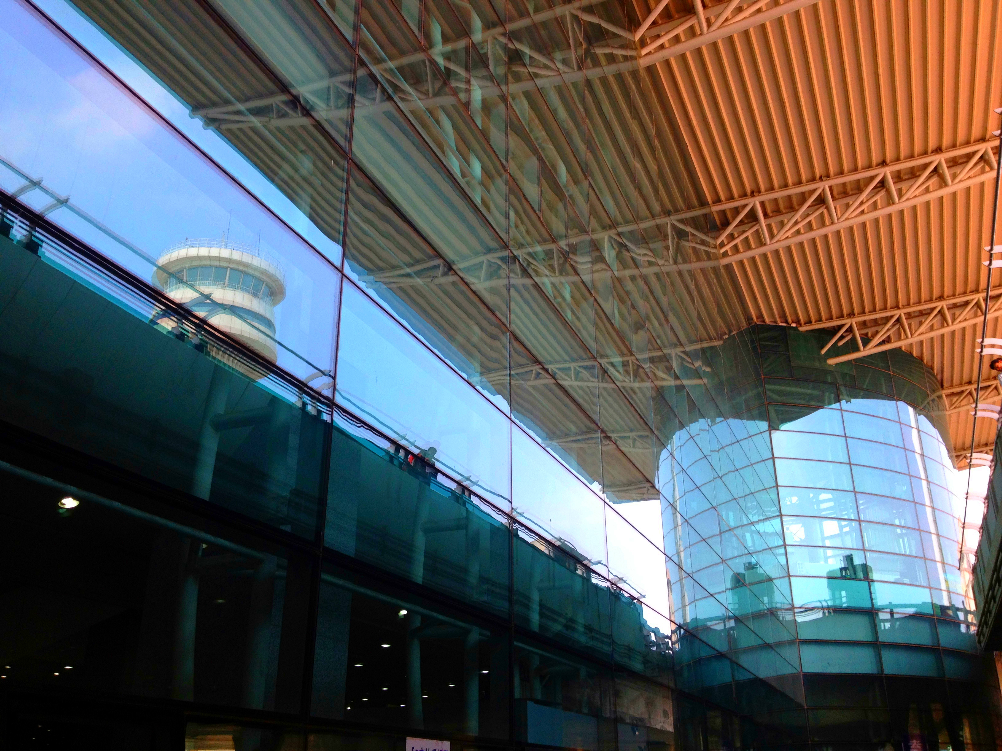 沈阳桃仙国际机场玄关